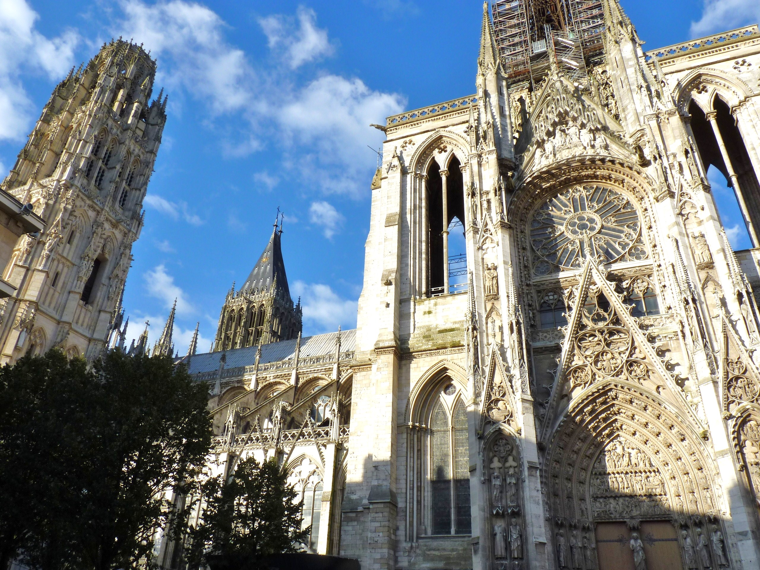 Cathédrale Notre-Dame .